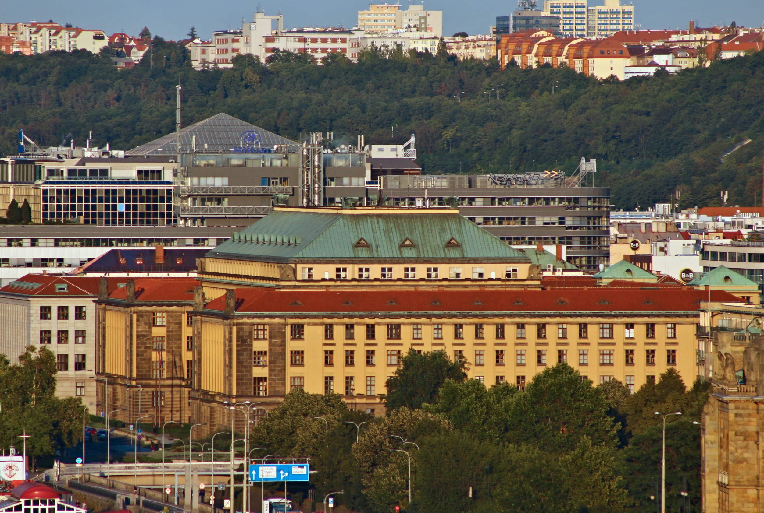 Pohled na Staré Město z Letné